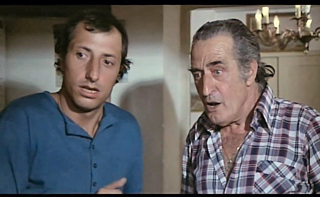 Screenshot dal film Furto di sera bel colpo si spera (1974)